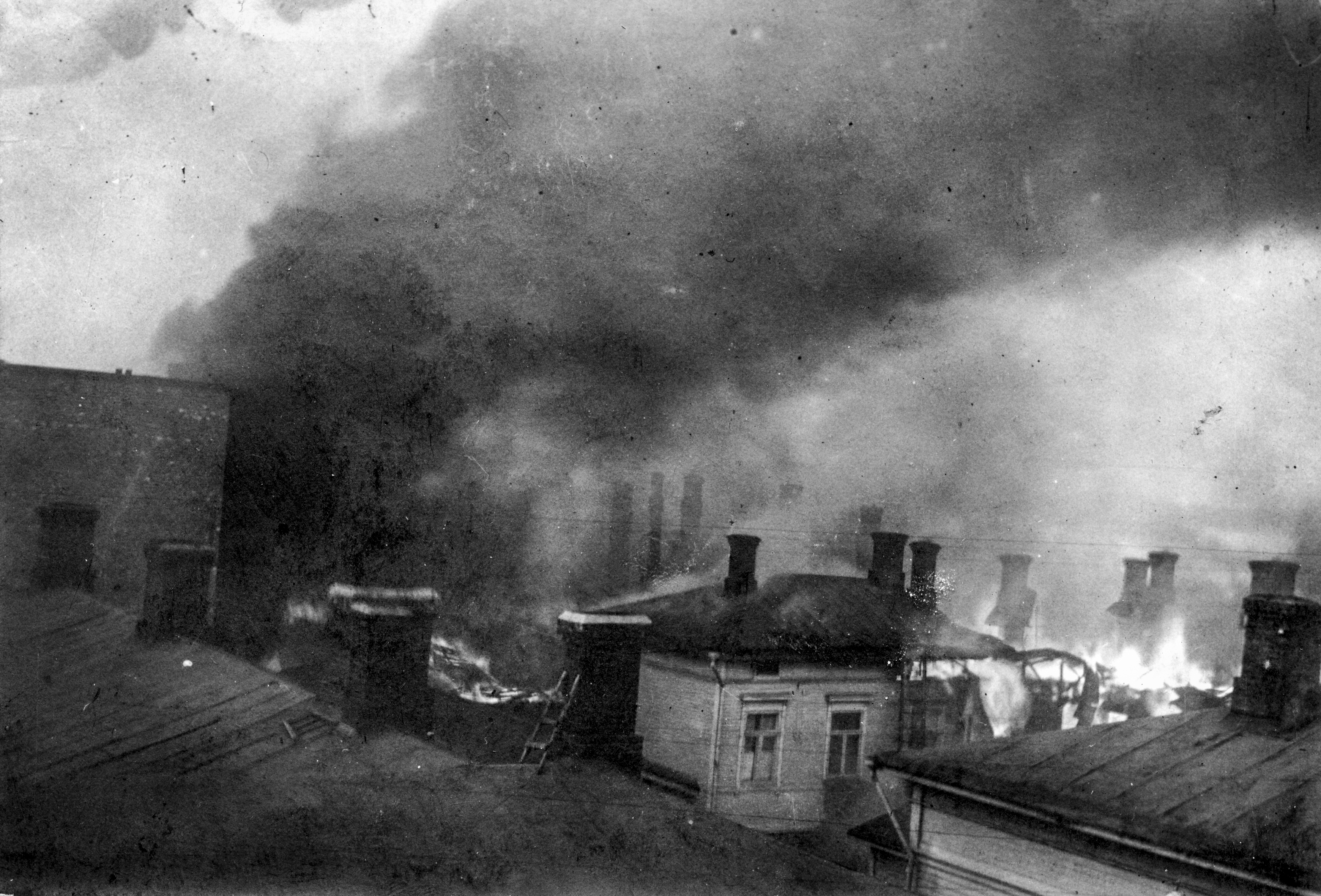 Kuvauspaikka on Verkatehtaankadun ja Pellavatehtaankadun risteys. CC-BY Tampere 1918, kuvaaja tuntematon, Vapriikin kuva-arkisto. Finnish Civil War 1918, Photographer unknown, Vapriikki Photo Archives.